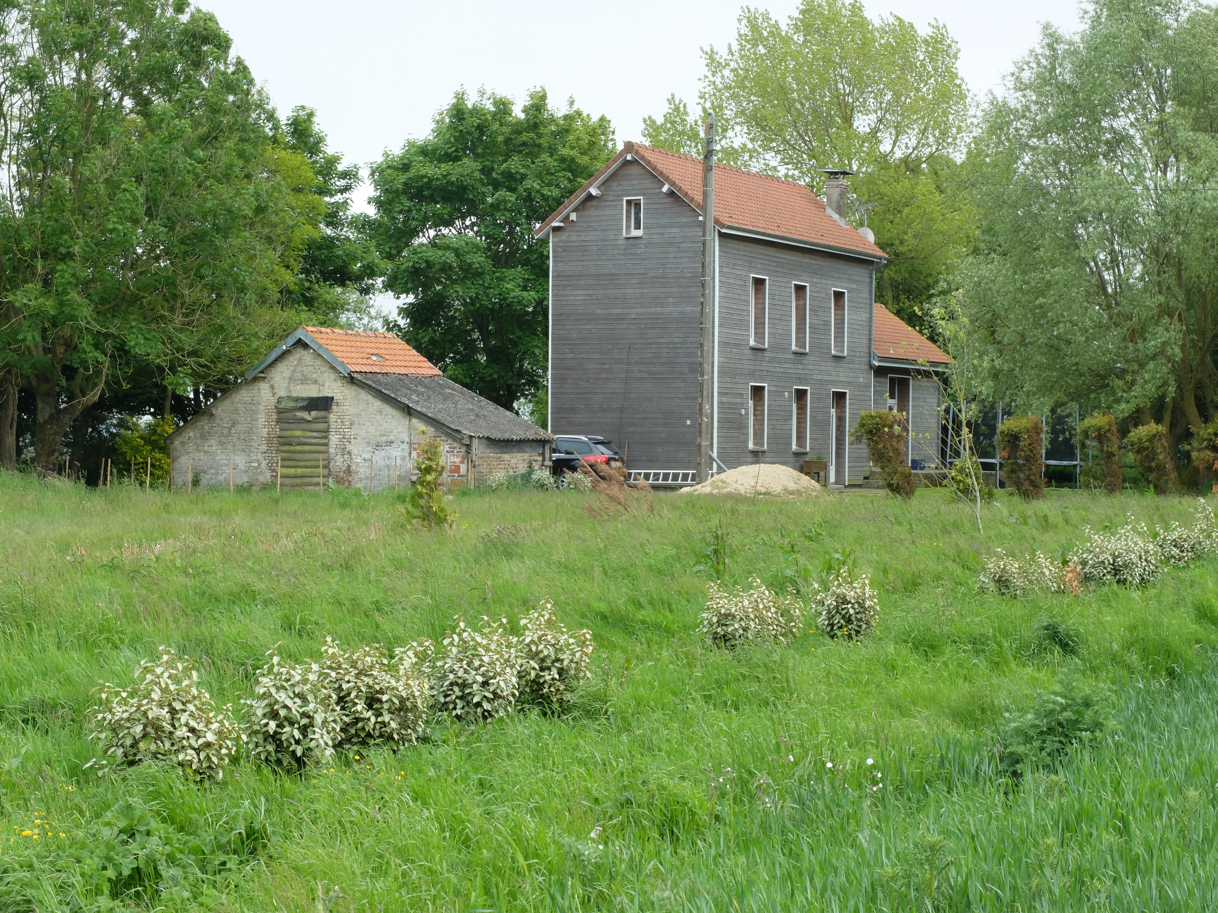 Vue de l'ancienne gare de Campigneulles, devenue maison d'habitation.